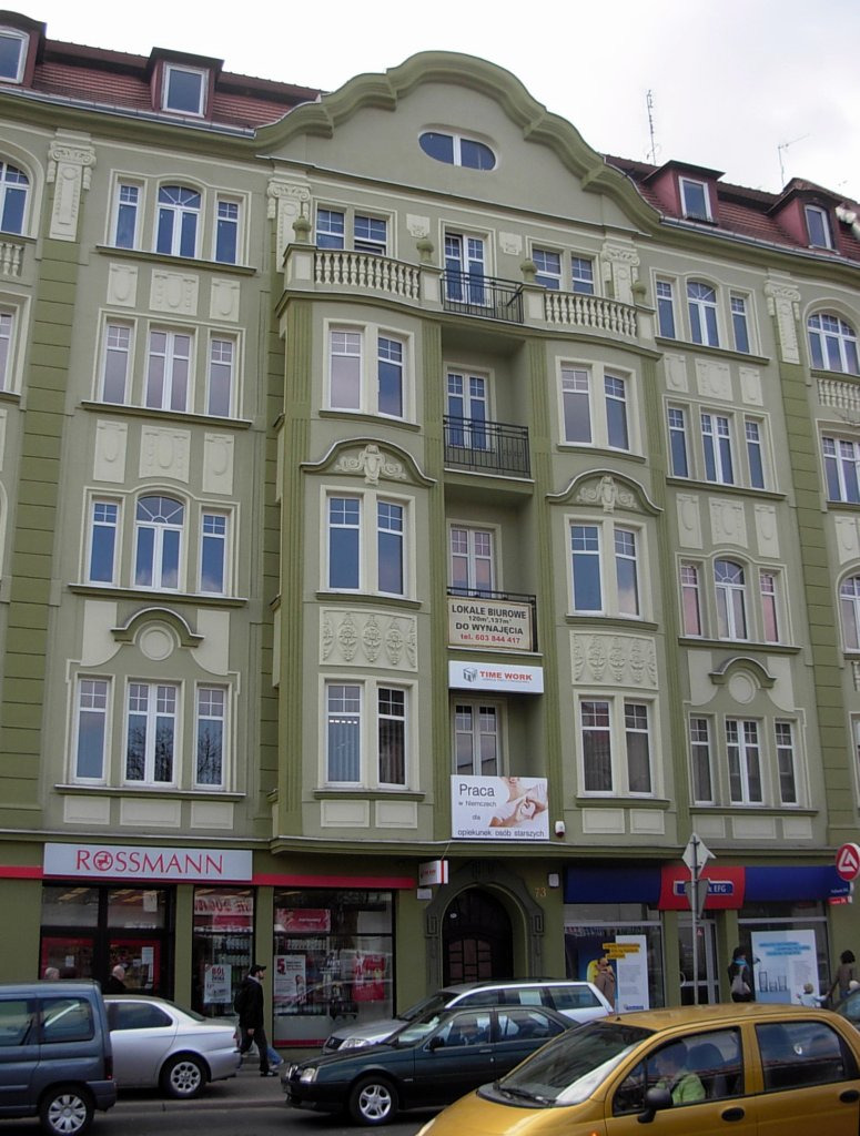 Kamienica ul. Dworcowa 73 w Bydgoszczy